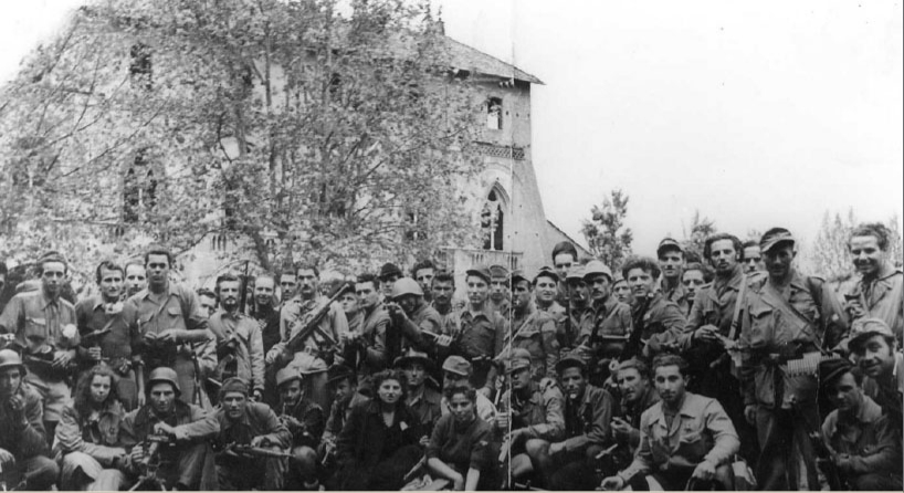 Castello di Pavia: Eva Colombo, seduta in prima fila (in basso al centro; alla sua destra Dina Croce), tra i Partigiani dell'Oltrepò Pavese subito dopo la Liberazione